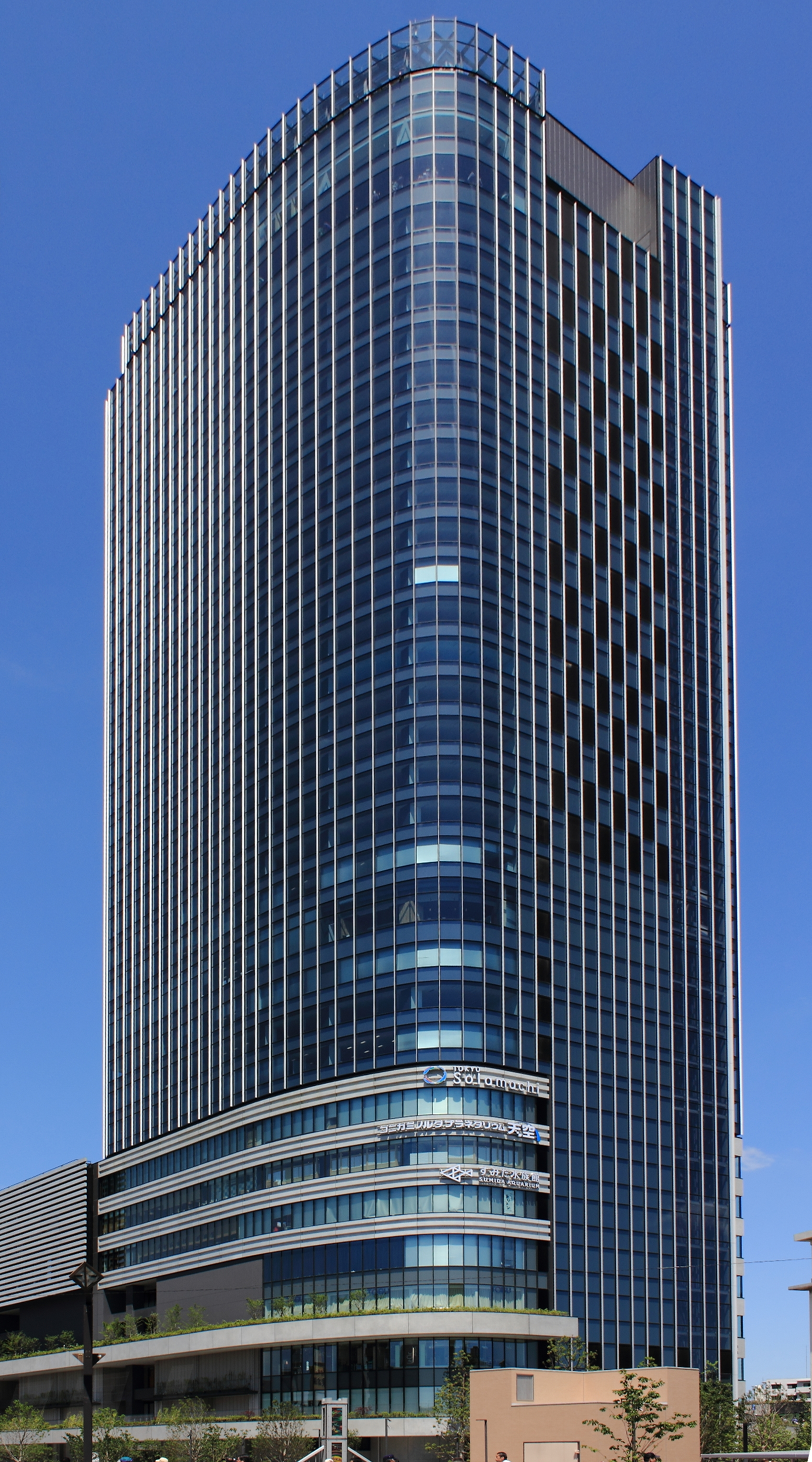 東京スカイツリー イーストタワー（東京都墨田区）。